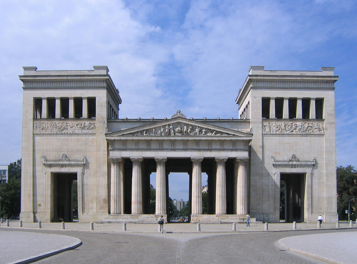 Propyläen am Königsplatz in München